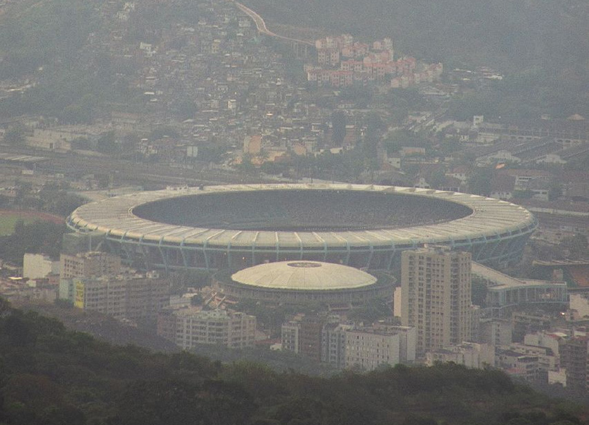 Estádio Jornalista Mário Filho (Maracanã).